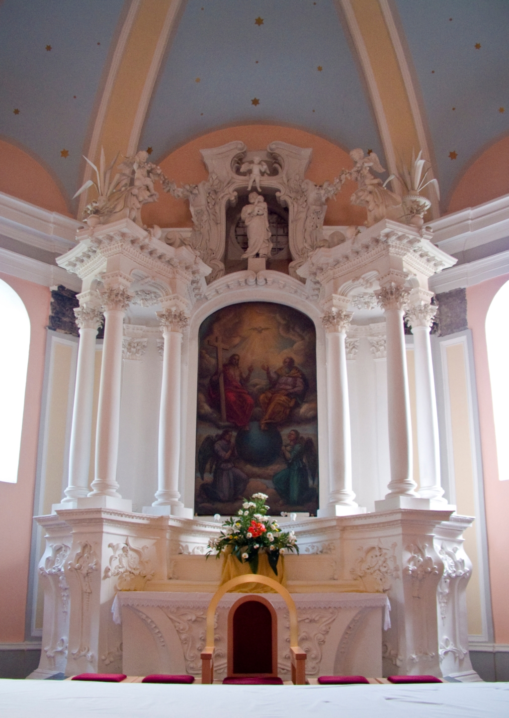 Crkva Svetog Trojstva u Otočcu